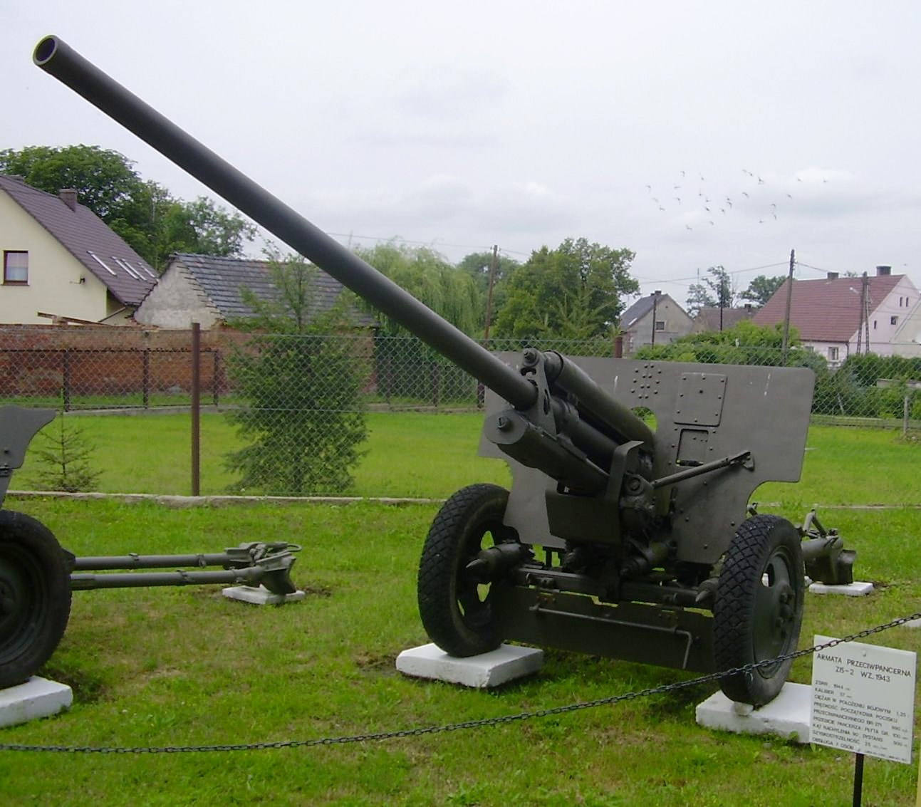 57 mm armata przeciwpancerna wz. 1943 (ZiS-2)